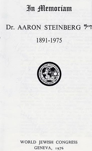 Aaron Steinberg World Jewish Congress Geneva 1976, 27p.